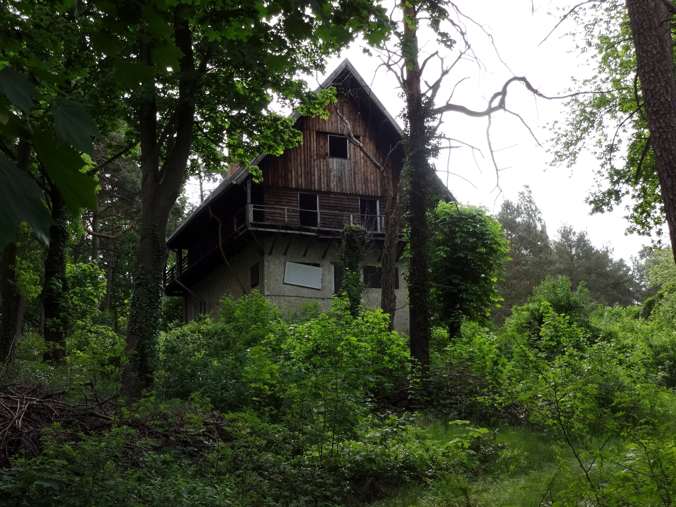 Das Eichberg-Haus ist ein denkmalgeschütztes Bauwerk, das vermutlich im Jahr 1923 errichtet wurde. In dem Haus wohnte zunächst der Schachspieler Emanuel Lakser, später der Filmproduzent und Namensgeber Richard Eichberg.